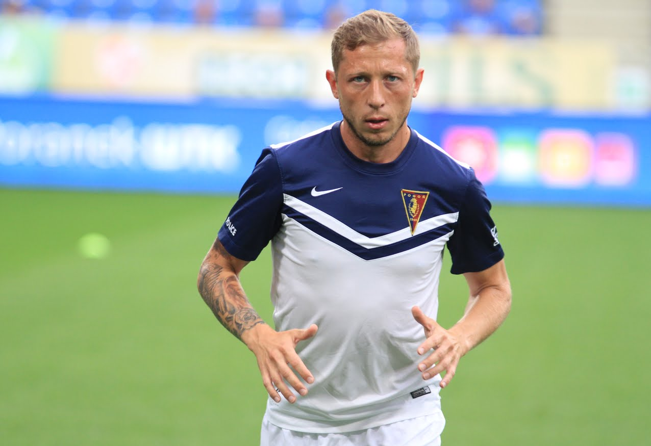 Rafał Murawski warming-up for Pogoń Szczecin